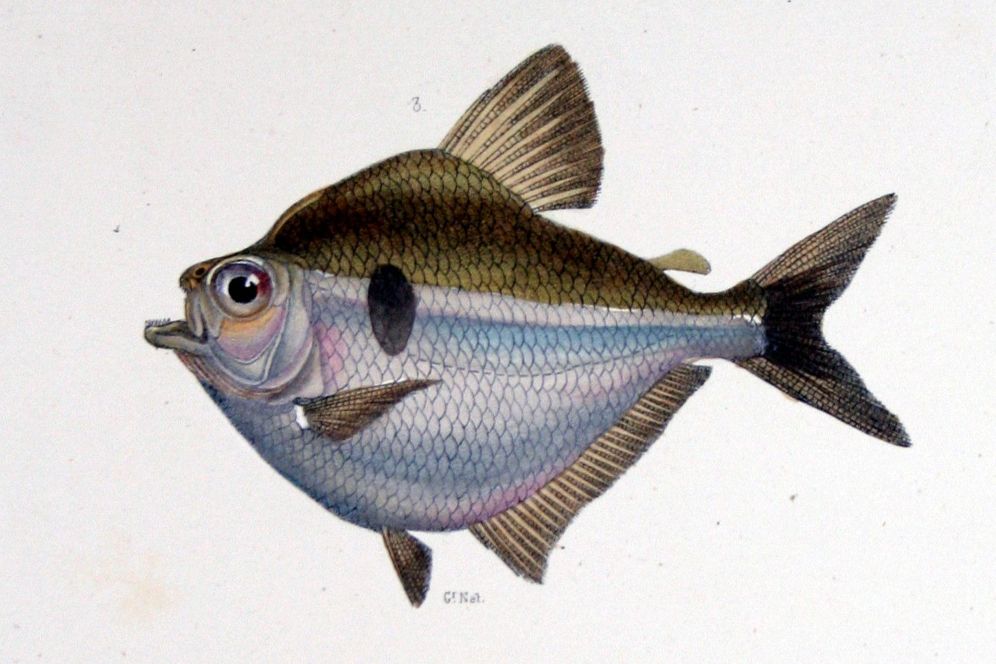 Tetragonopterus orbicularis Cuv. Val. = Brachychalcinus orbicularis (Valenciennes, 1850)